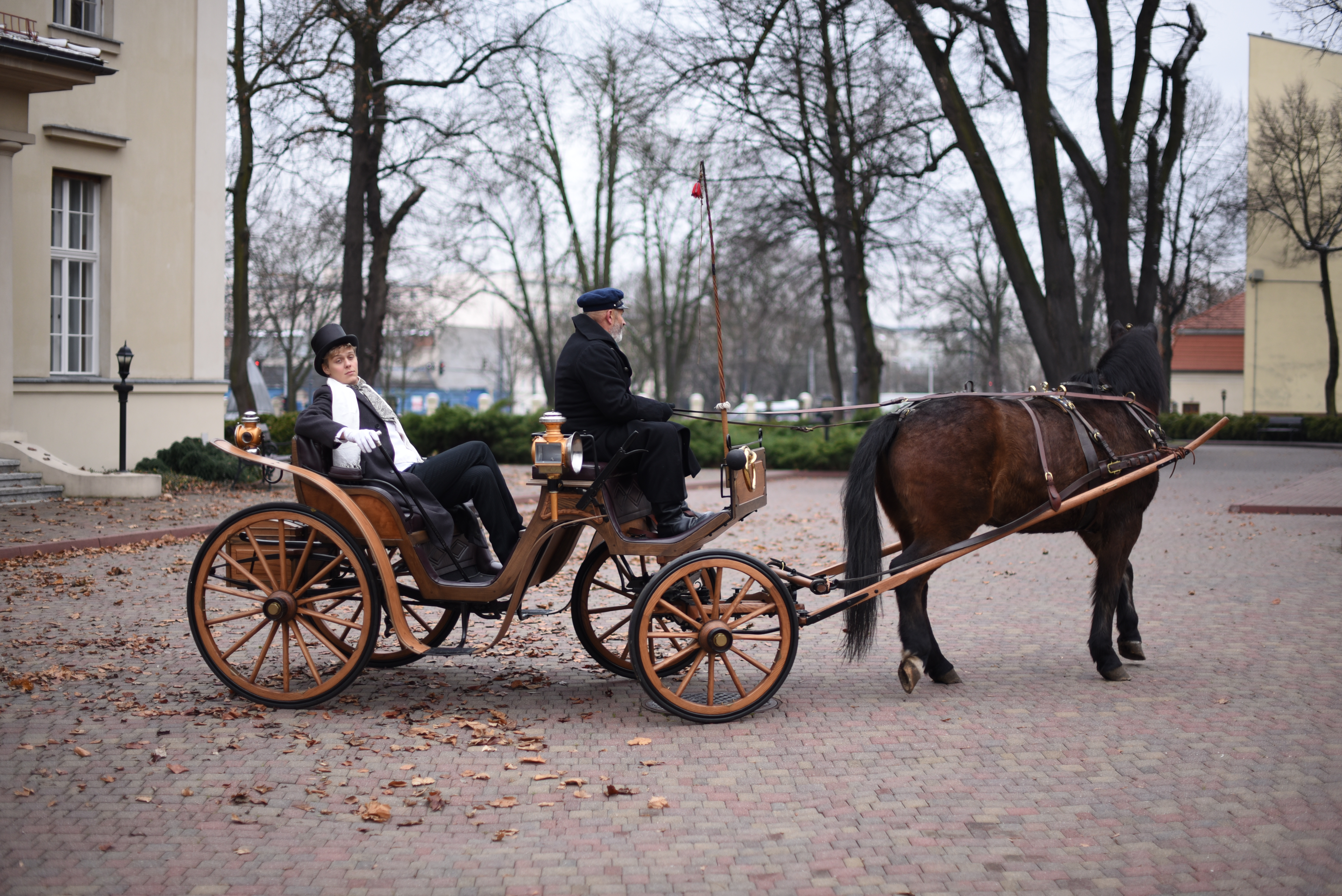 Zdjęcie z planu filmowego odtworzonej wersji "Powrotu birbanta"